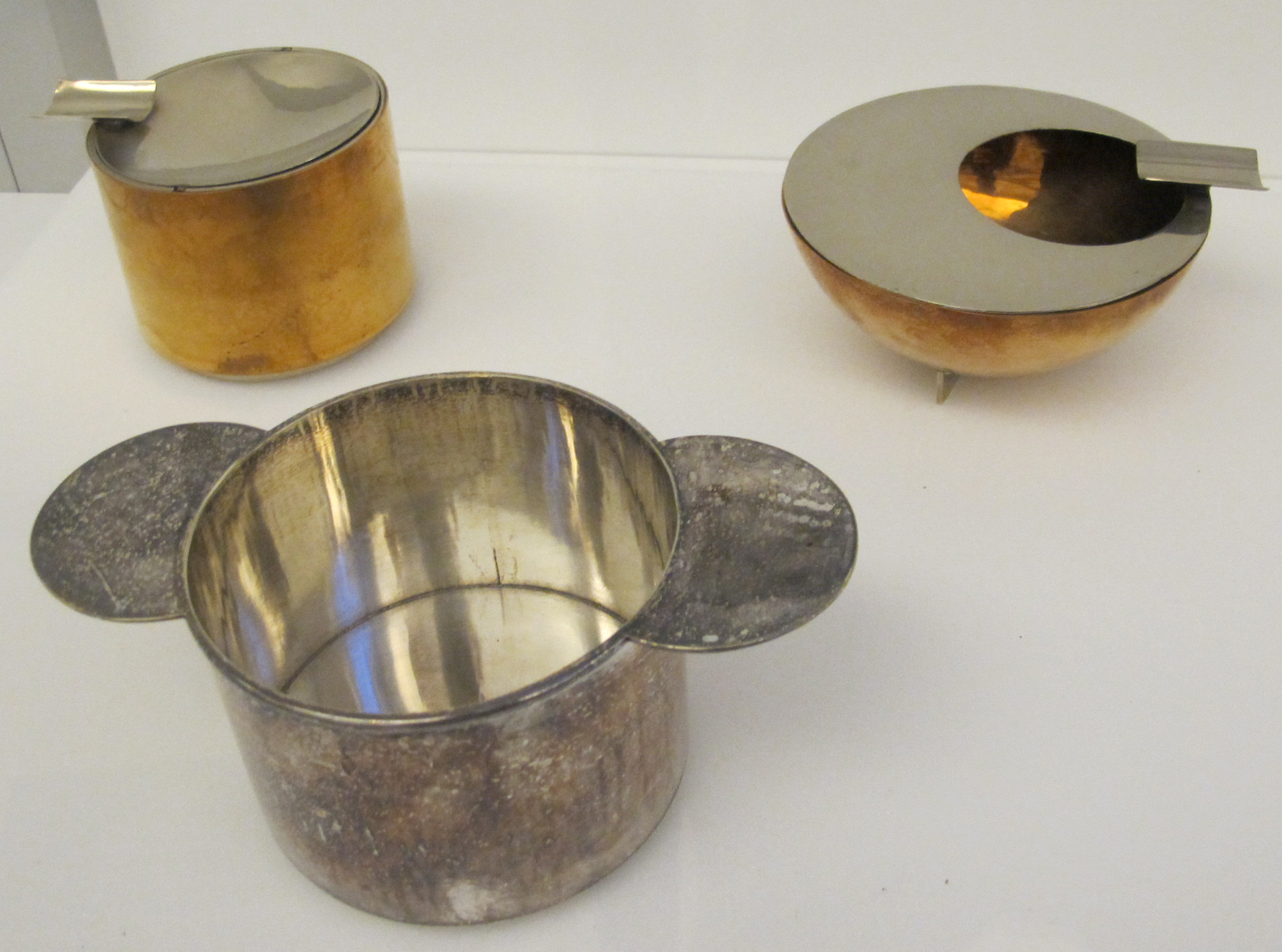 Marianne brandt, portacenere, 1924